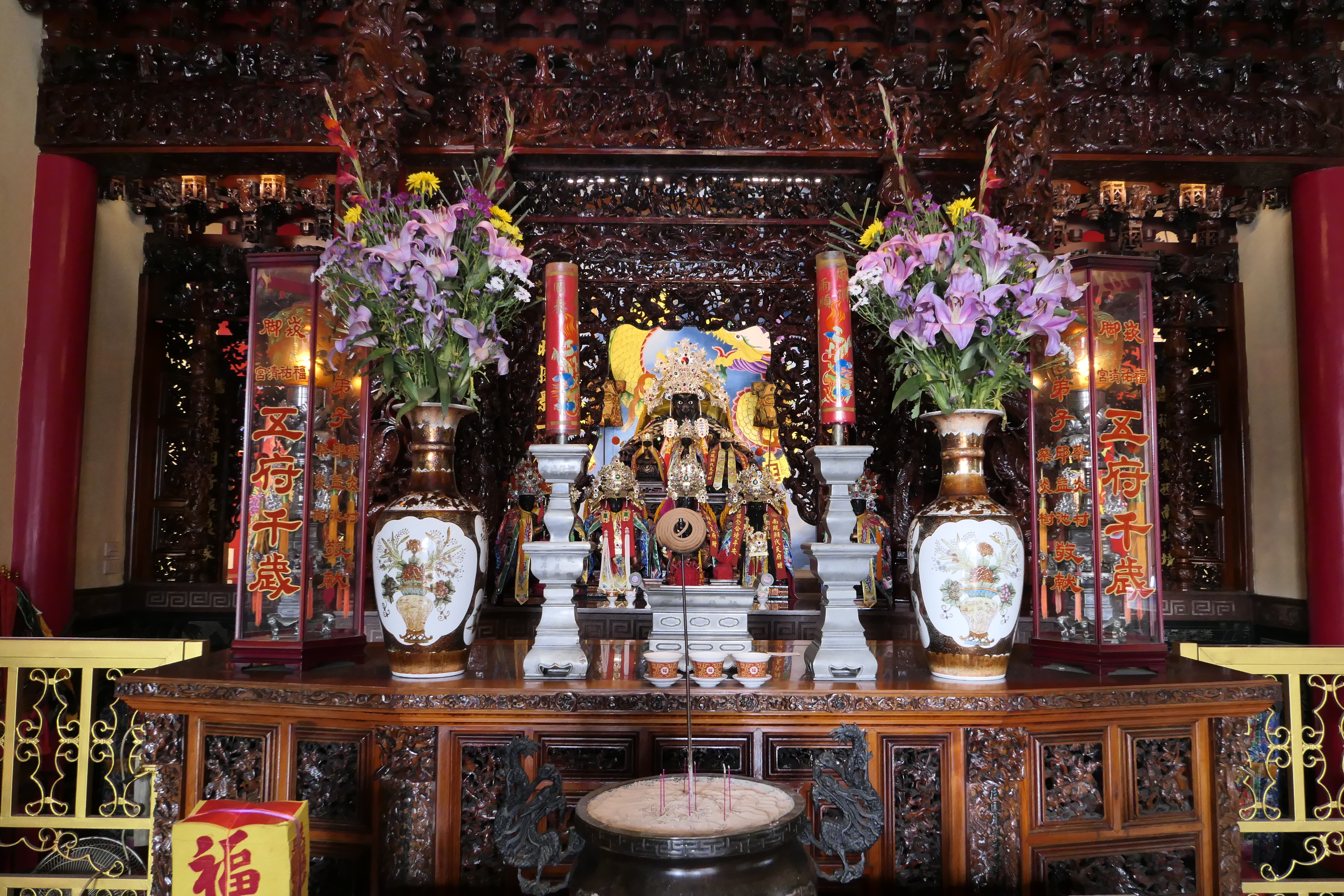 崁腳福祐清宮正殿